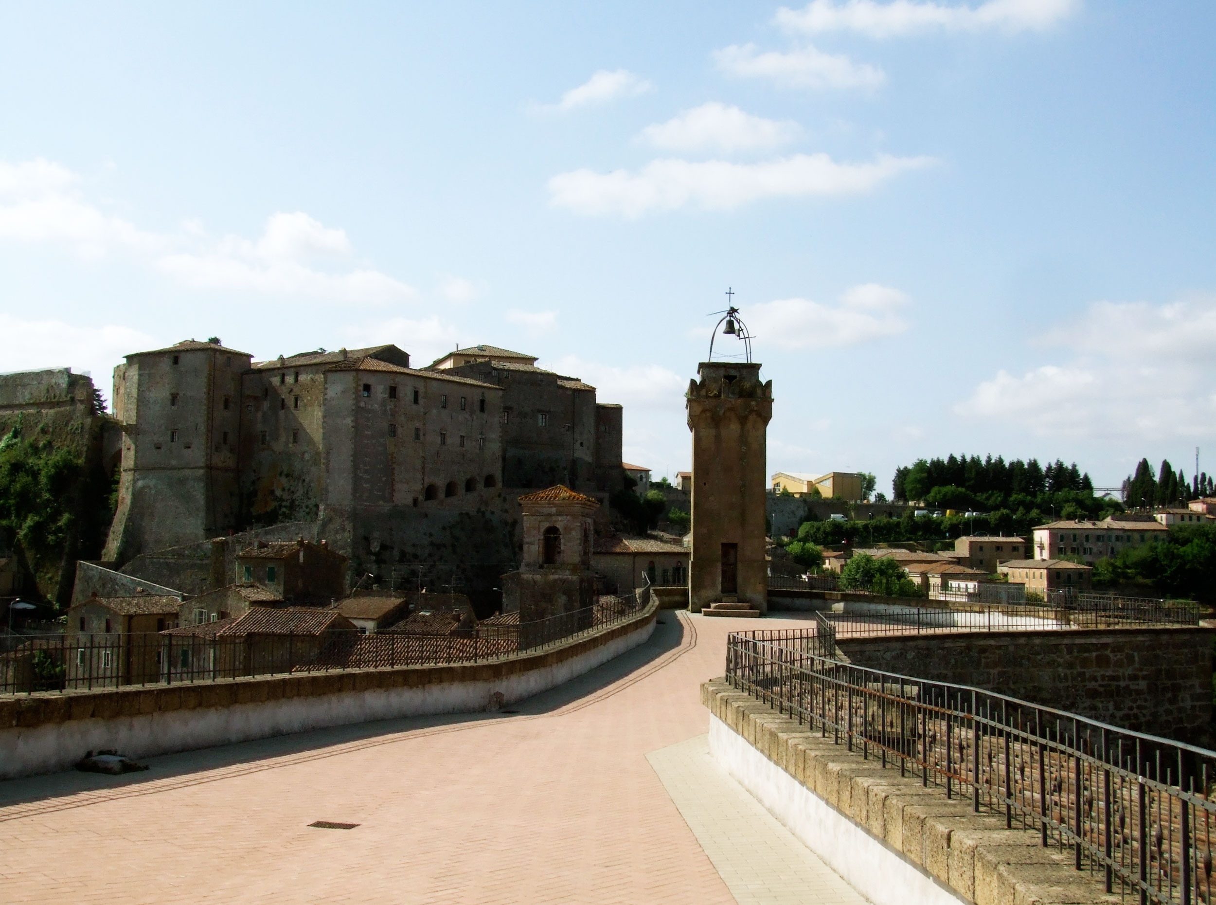 Le Masso Leopoldino de Sorano (Toscane)